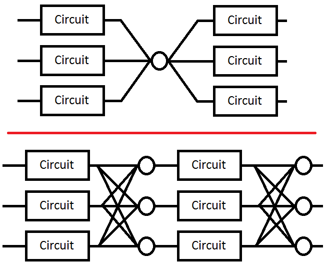 Triple Modular Redundancy et sa variante améliorée